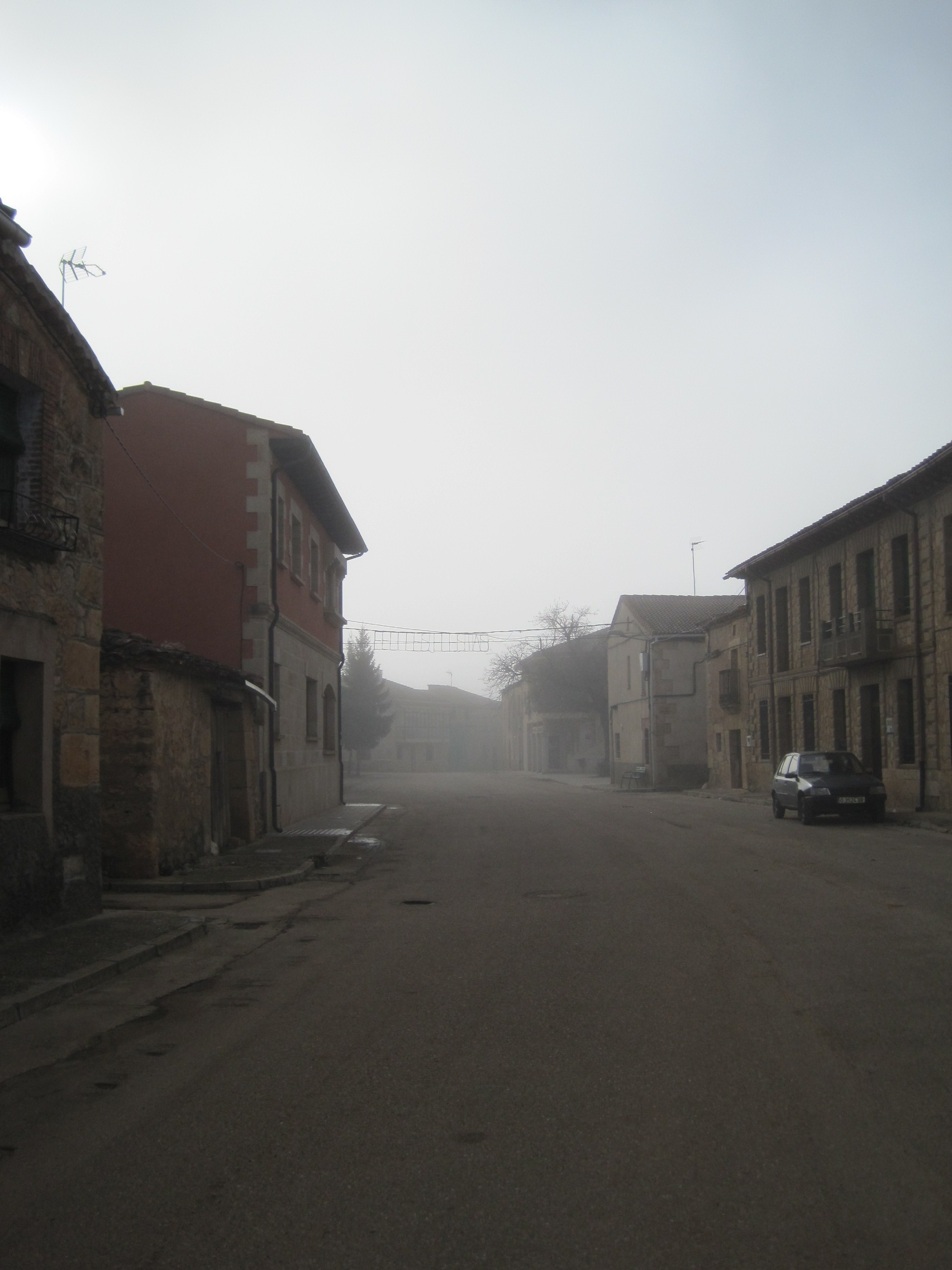 Calle Real de Quintanarraya (Burgos, España).